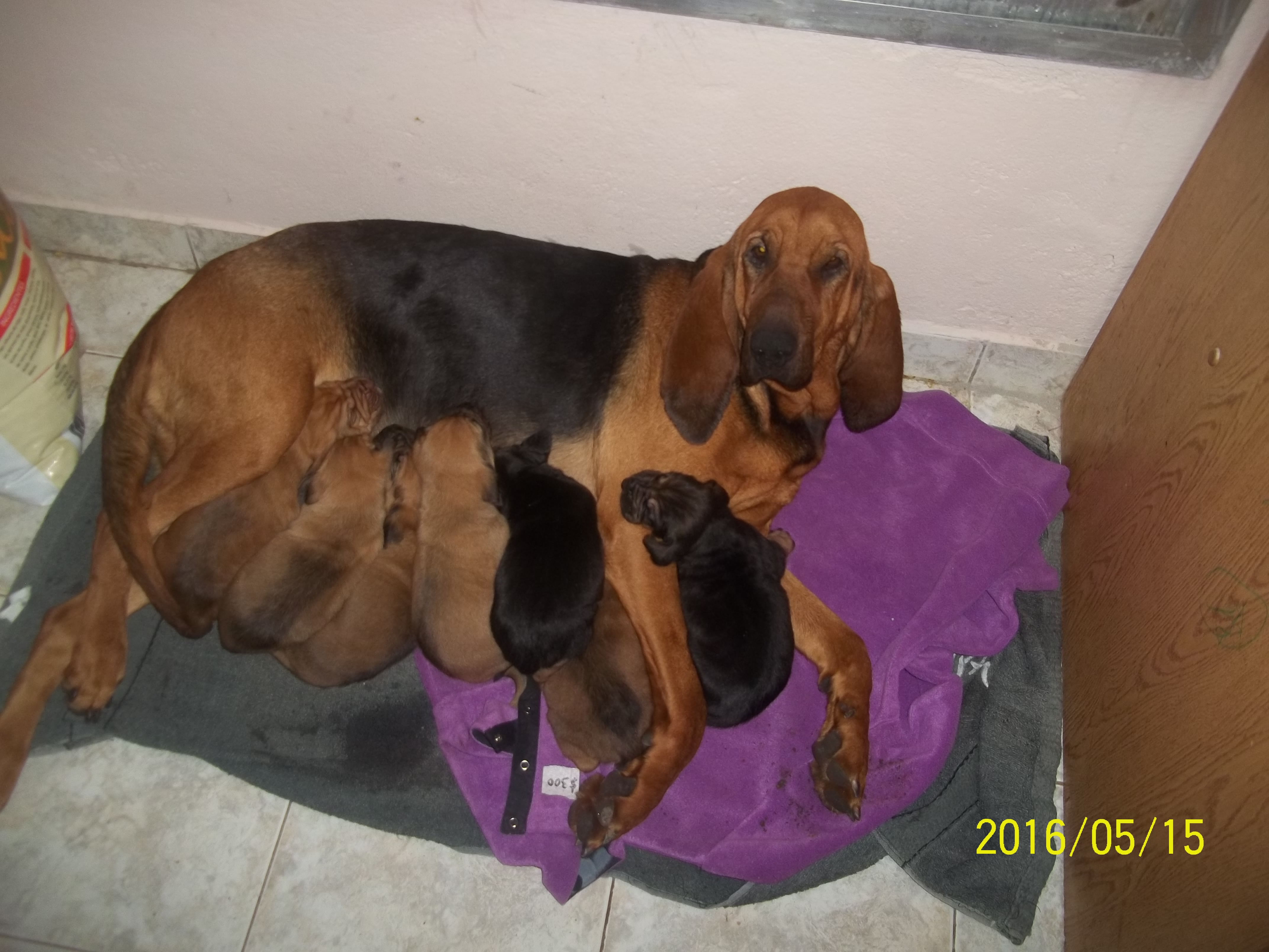 mis perritos